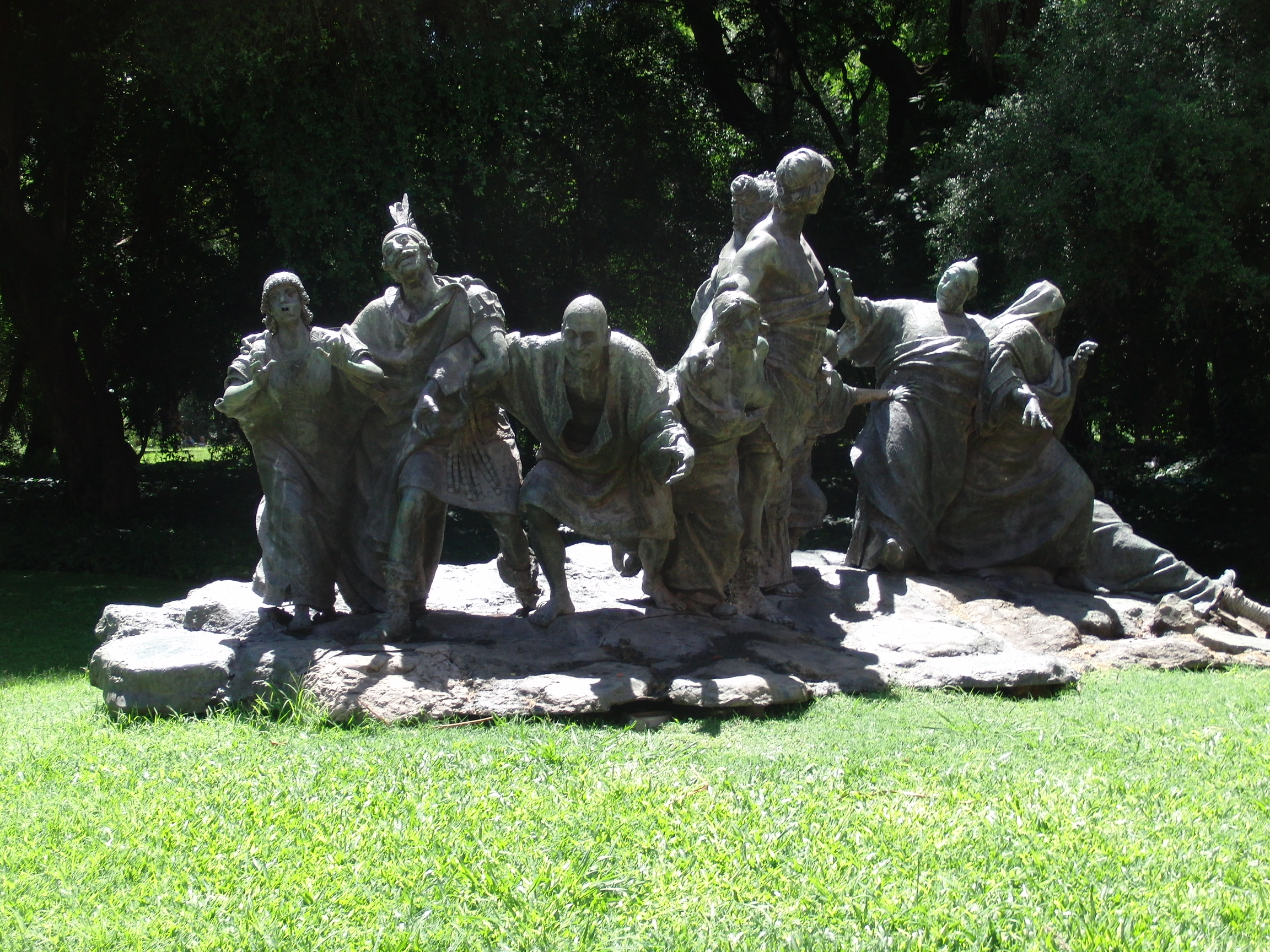 'Saturnalia' Skulpturengruppe von Ernesto Biondi in Buenos Aires ( im Botanischen Garten)